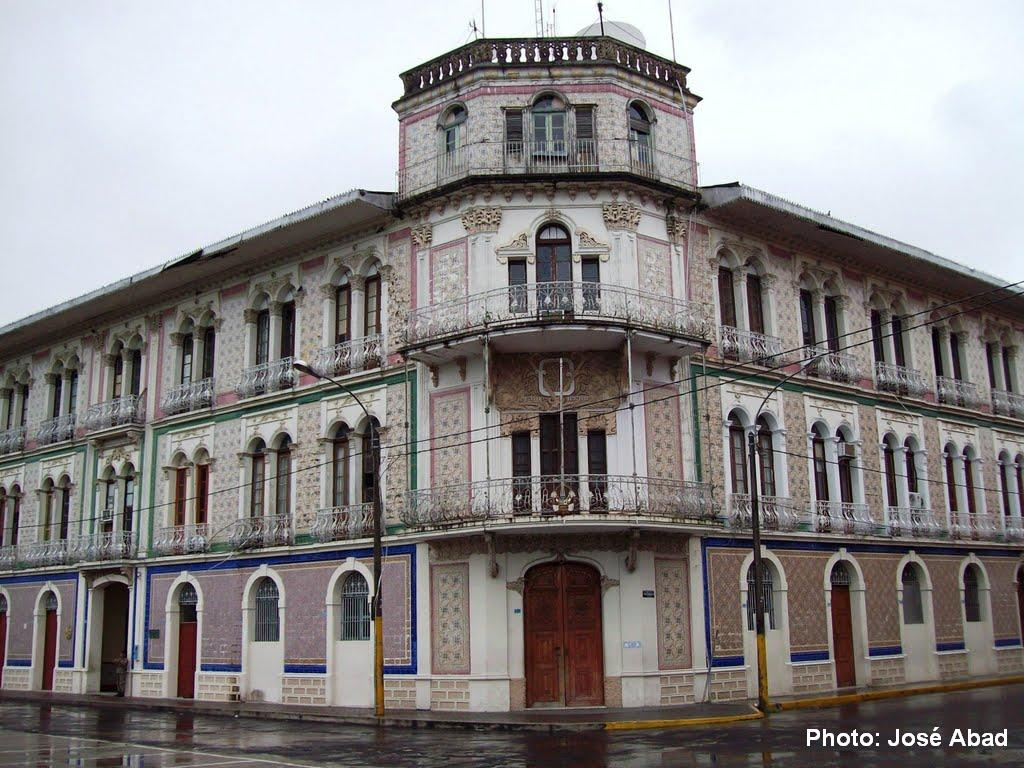 Este hotel de estilo Art Noveau, se empezó a construir en 1908 en la ciudad de Iquitos, en plena época del auge del caucho. Aqui se hospedaban caucheros y comerciantes europeos Tiene tres pisos y un mirador que da hacia el Amazonas. La fachada está adornada con azulejos italianos decorados a mano, las puertas y ventanas terminan en arcos de medio punto y las barandas de hierro forjado, traídas desde Hamburgo, tienen detalles de hojas y flores. Fue el mejor hotel de Iquitos y una de las construcciones más bellas de la ciudad. Actualmente se encuentra en buen estado de conservación, y pertenece a una institución militar. El edificio se encuentra en el Malecón Tarapacá.